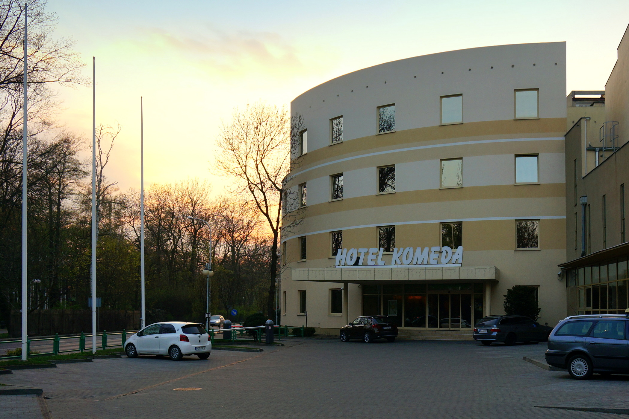 Ostrów Wlkp. Hotel Komeda, ul. ks. Kompałły 9